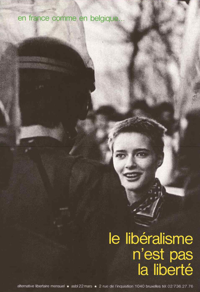 En France comme en Belgique... le libéralisme n'est pas la liberté. Affiche Alternative Libertaire (Belgique) 1987